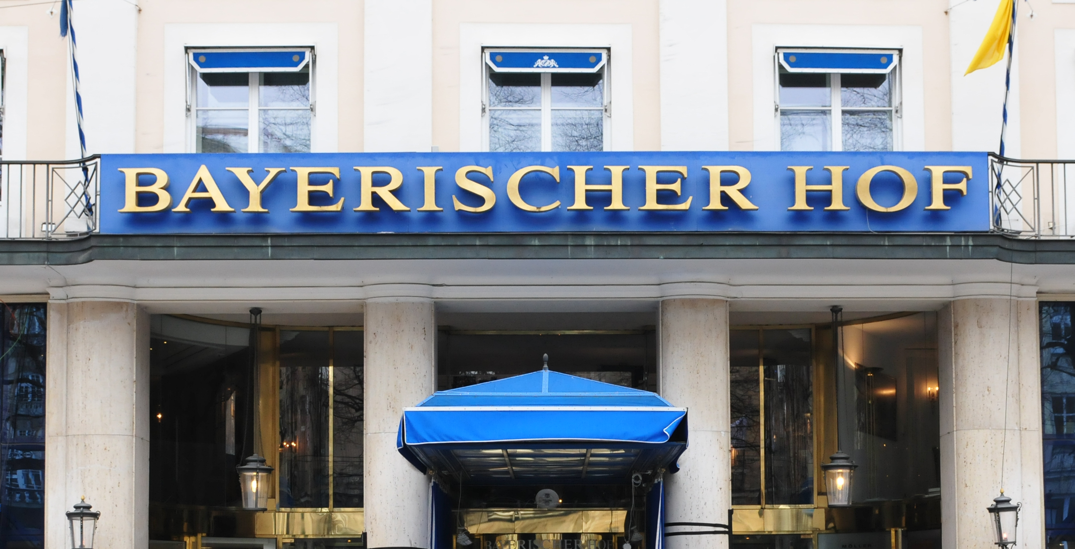 Munich Security Conference 2015 - Münchner Sicherheitskonferenz 2015